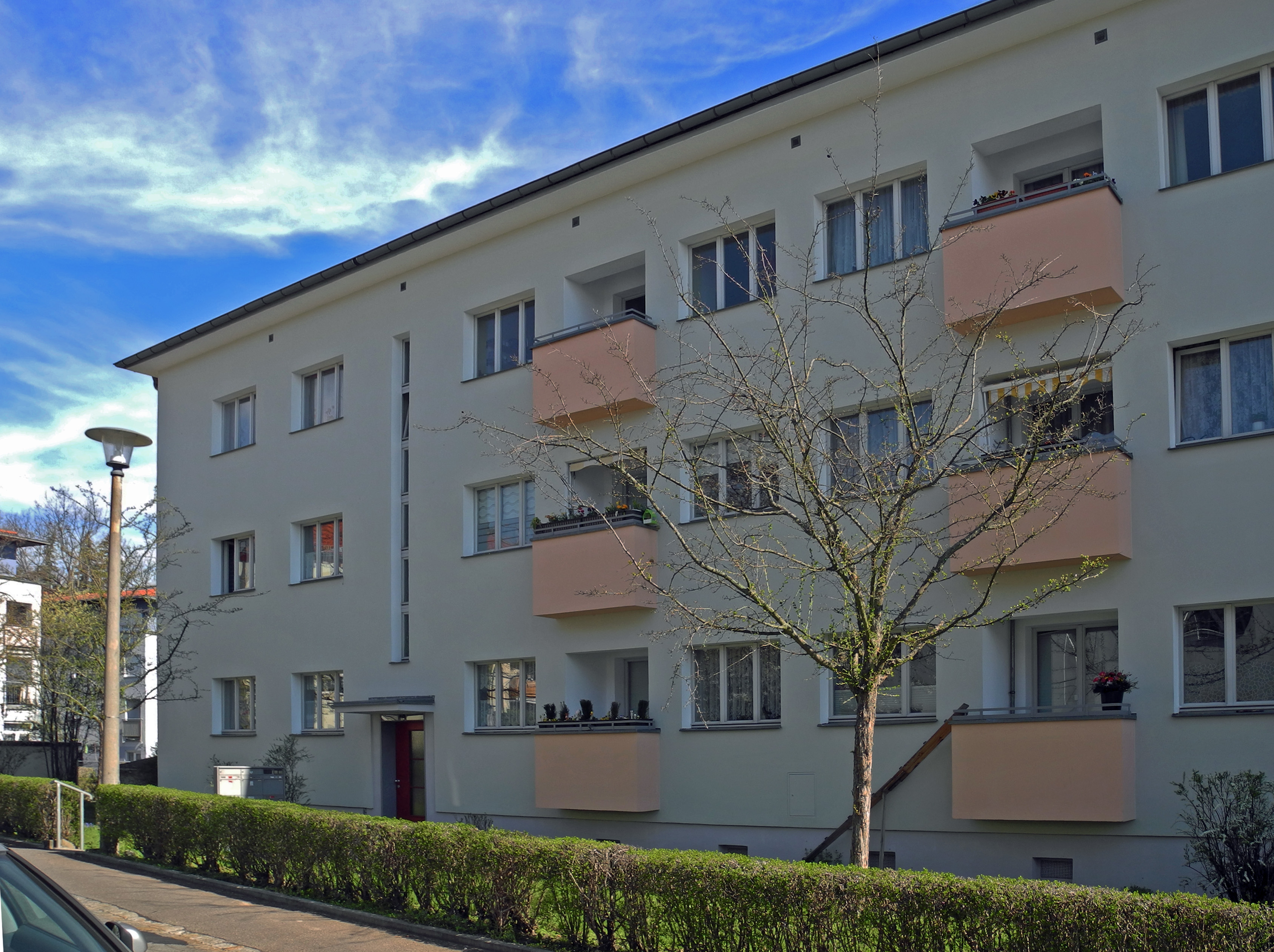 Wohnhäuser der Großsiedlung Trachau, Architekt: Hans Waloschek (1929–1931, unter Denkmalschutz innerhalb der Sachgesamtheit Großsiedlung Trachau). Dresden-Trachau, Richard-Rösch-Str. 40 (mit ehem. Wohnung von Richard Rösch)